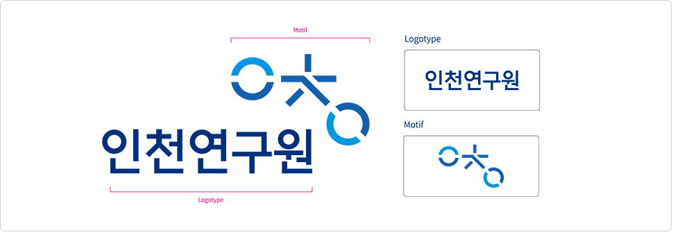 인천연구원 CI 입니다.